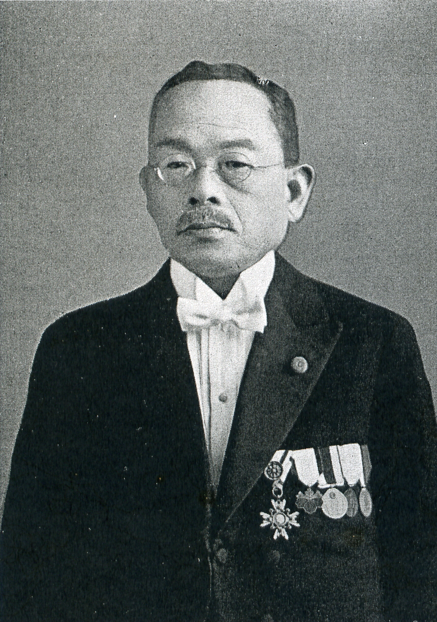 この写真は、松実喜代太（1866-1953）の写真です。